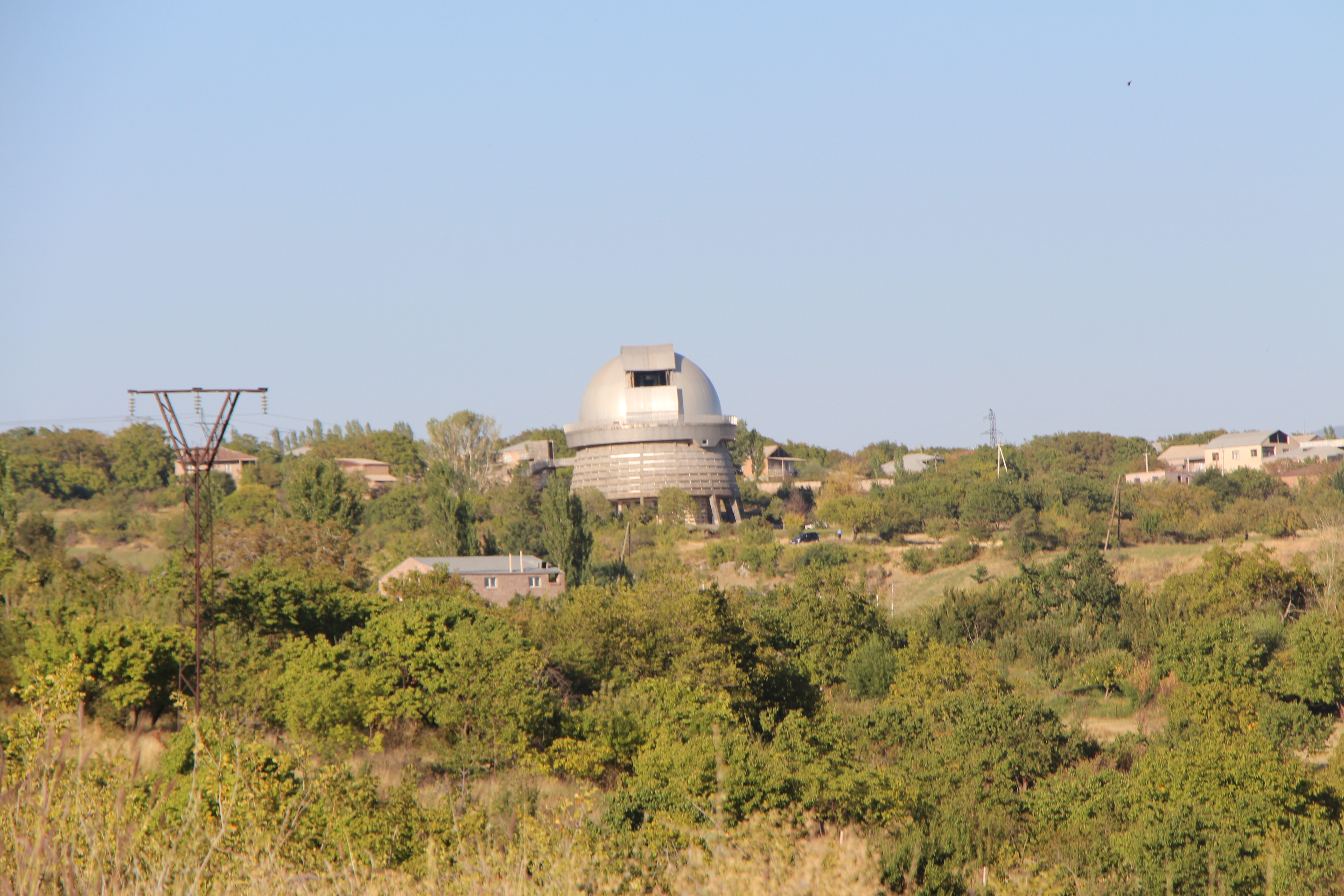 Բյուրական, Արագածոտնի մարզ, ԱՍՏՂԱԴԻՏԱՐԱՆԻ ՀԱՄԱԼԻՐ. ԲՅՈՒՐԱԿԱՆԻ ԱՍՏՂԱԴԻՏԱՐԱՆ 1945 թ.-ից այսօր հվ մասում 2.28/6 ճարտ.՝ Ս. Սաֆարյան, Ս. Գուրզադյան 28/6